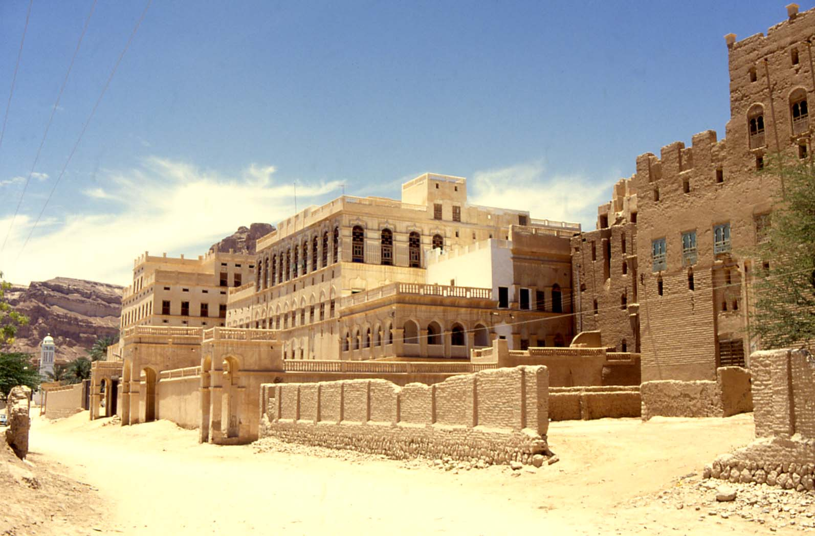 Yemen Tarim Hadhramaut 1994